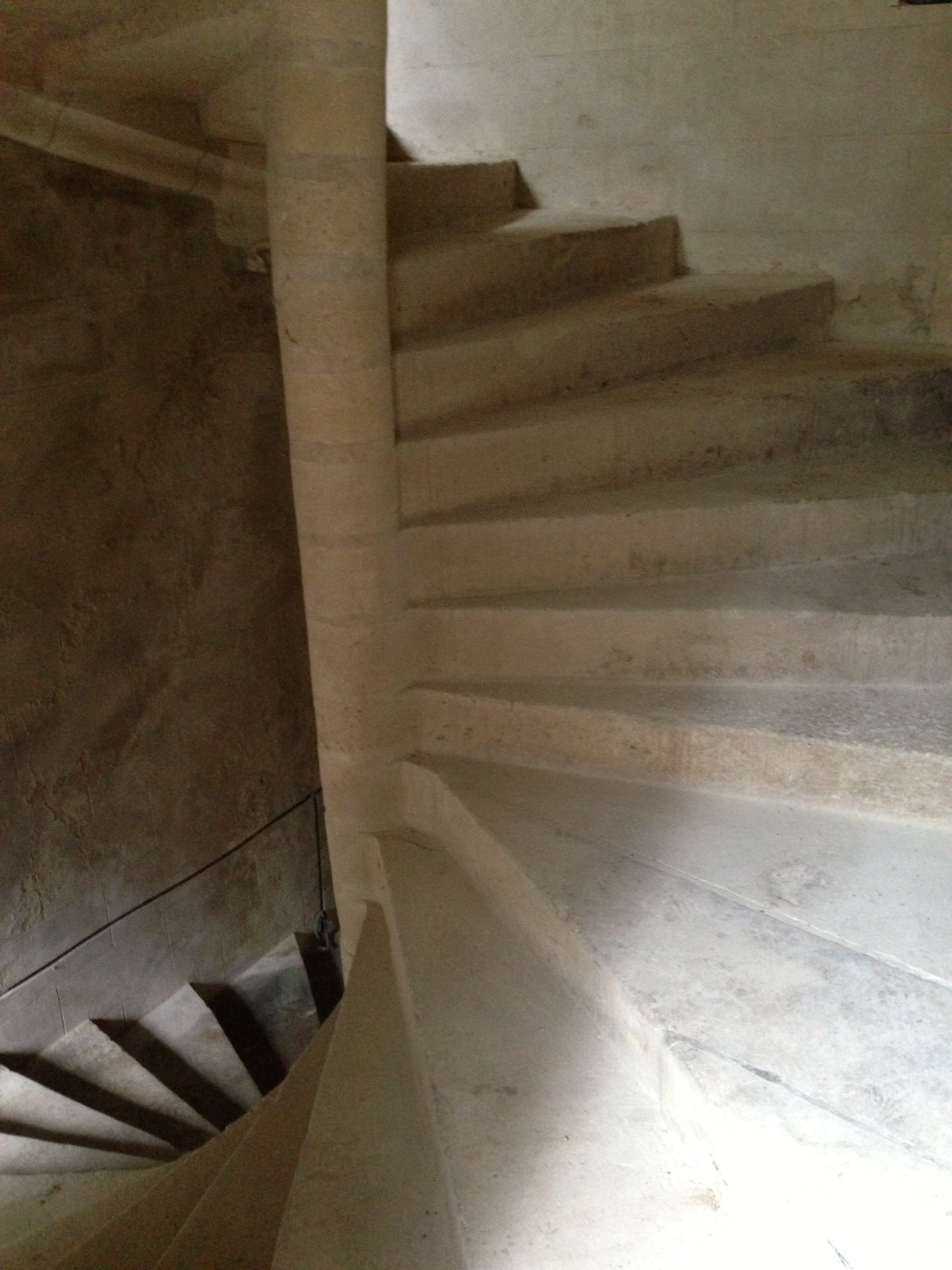 Escaliers à vis